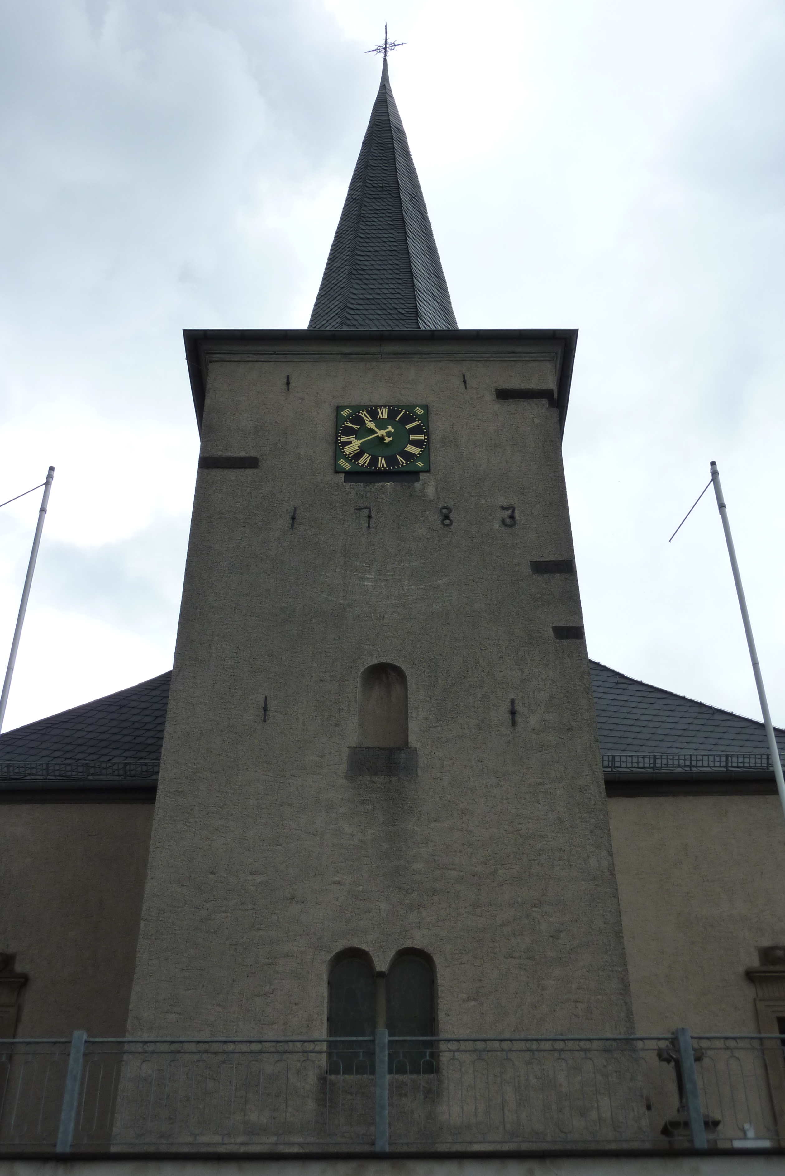 Westturm der katholischen Pfarrkirche St. Katharina in Karweiler, bez. 1783